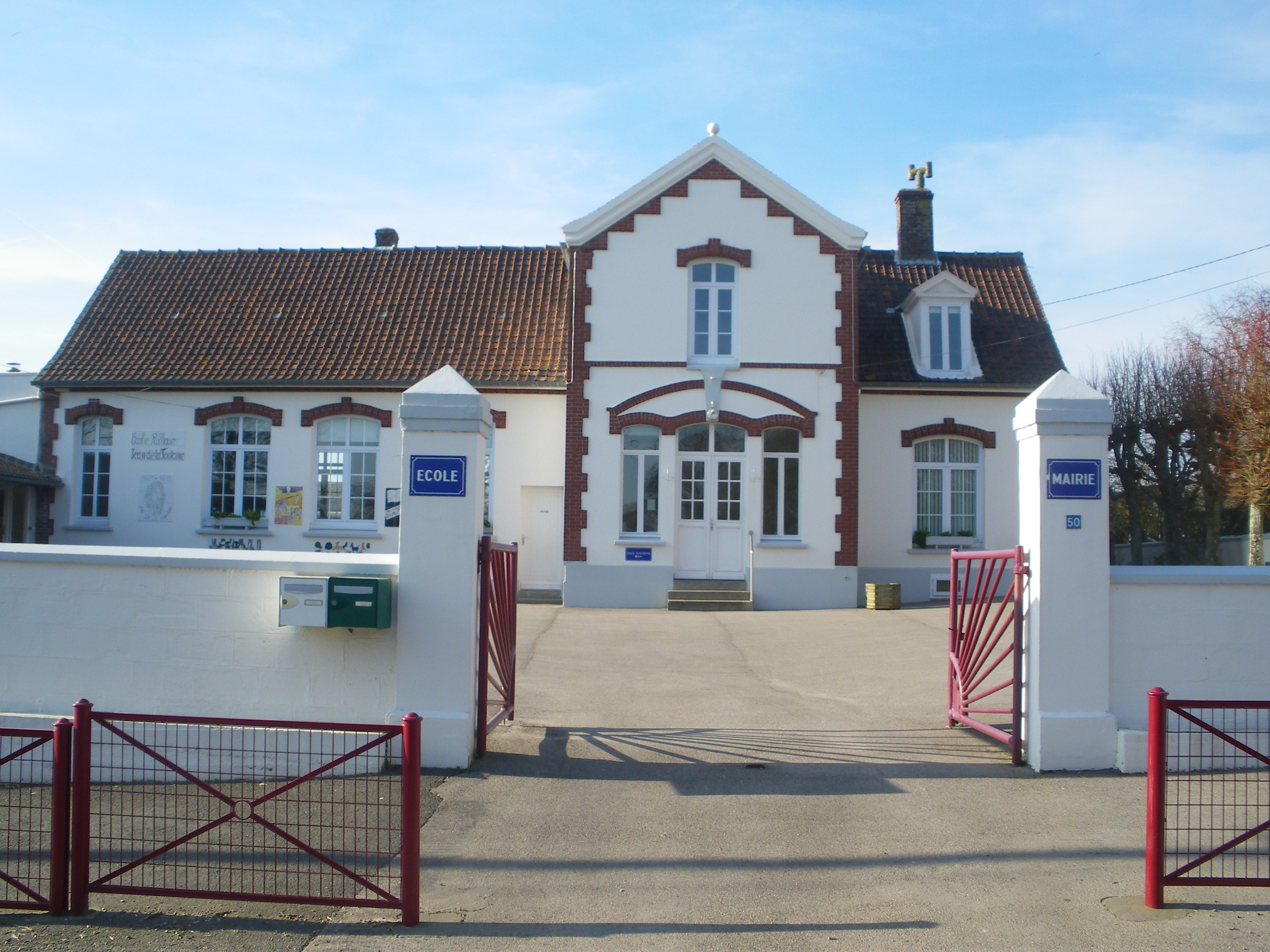 Vue de la mairie-école d'Audembert.